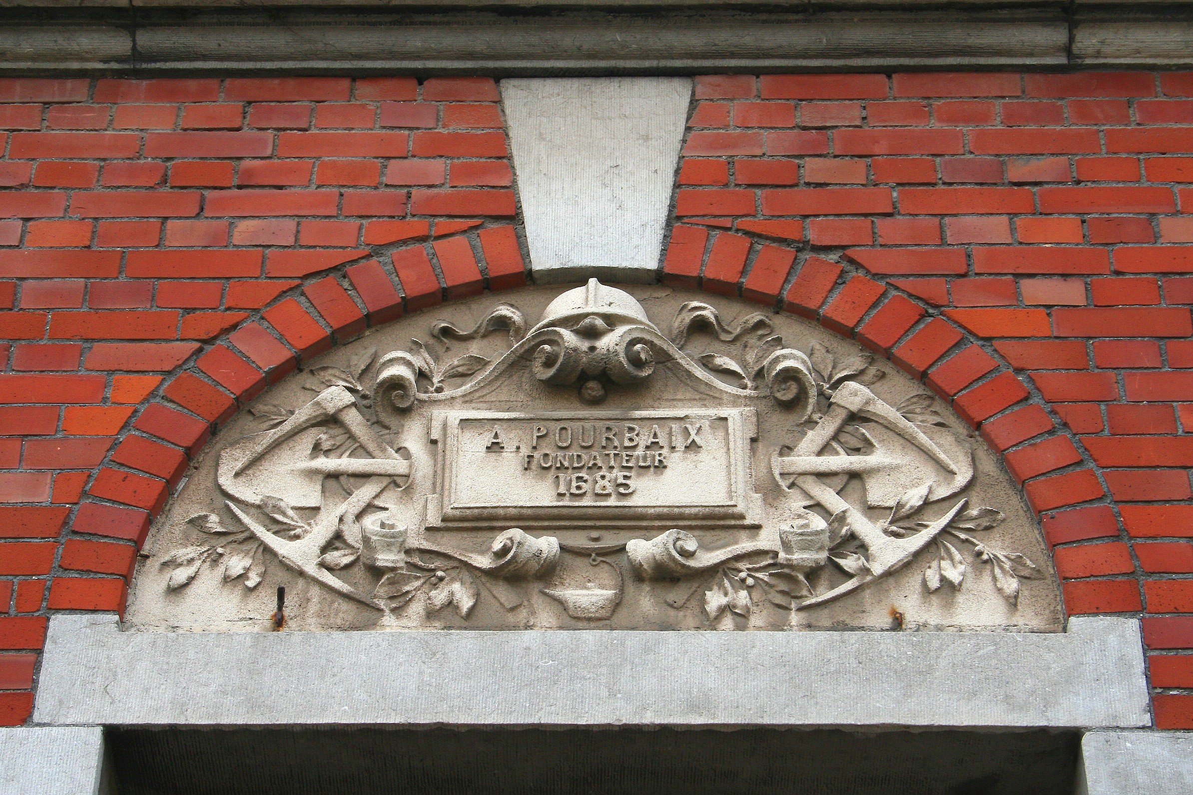 Houdeng-Aimeries (Belgique), pierre sculptée avec cartouche au nom d'Auger Pourbaix, millésime, volutes et décors ayant trait à l'équipement des mineurs ornant un des frontons de la façade du bâtiment principal du charbonnage du «Bois-du-Luc» (1838-1853).